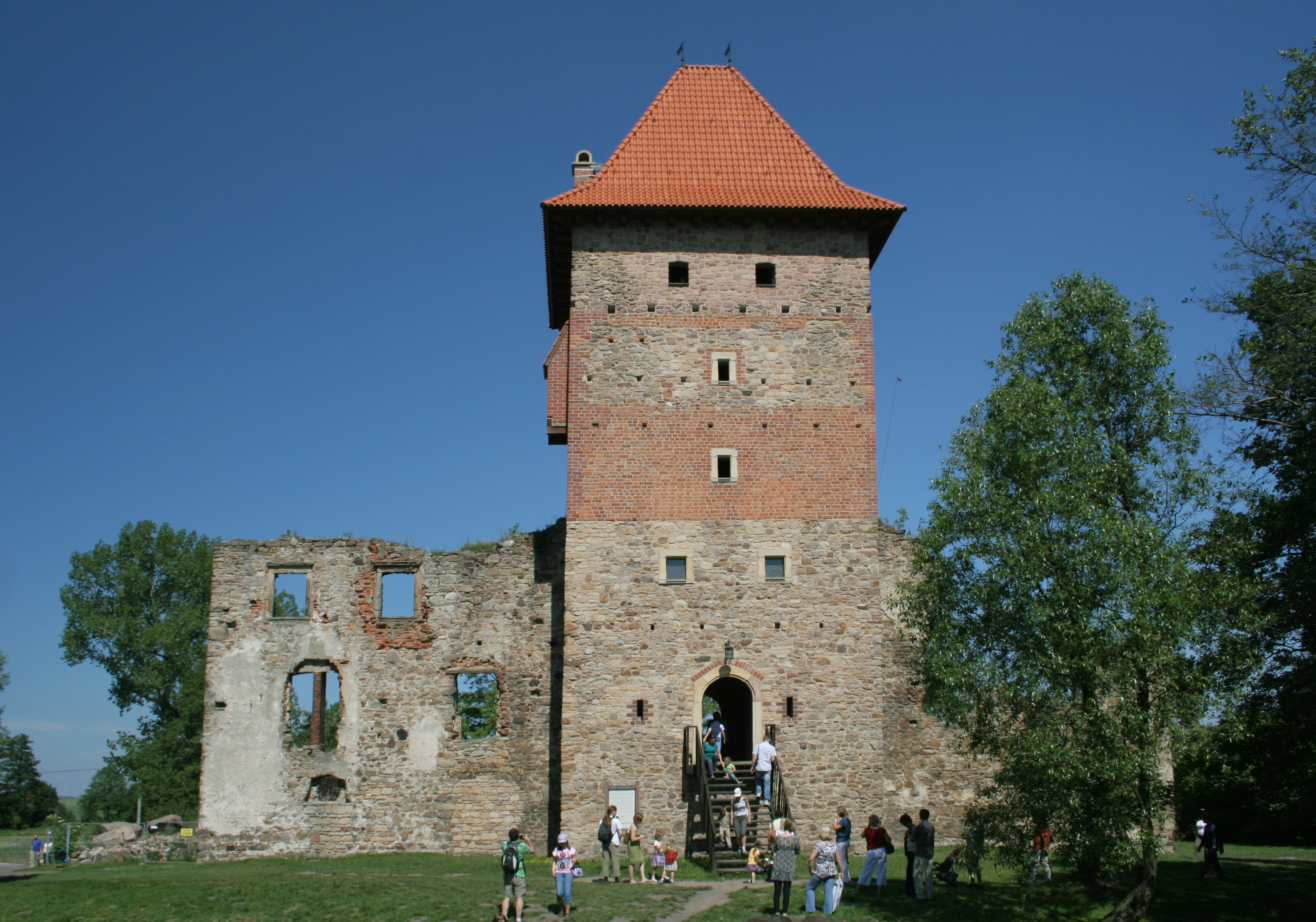 Zamek w Chudowie